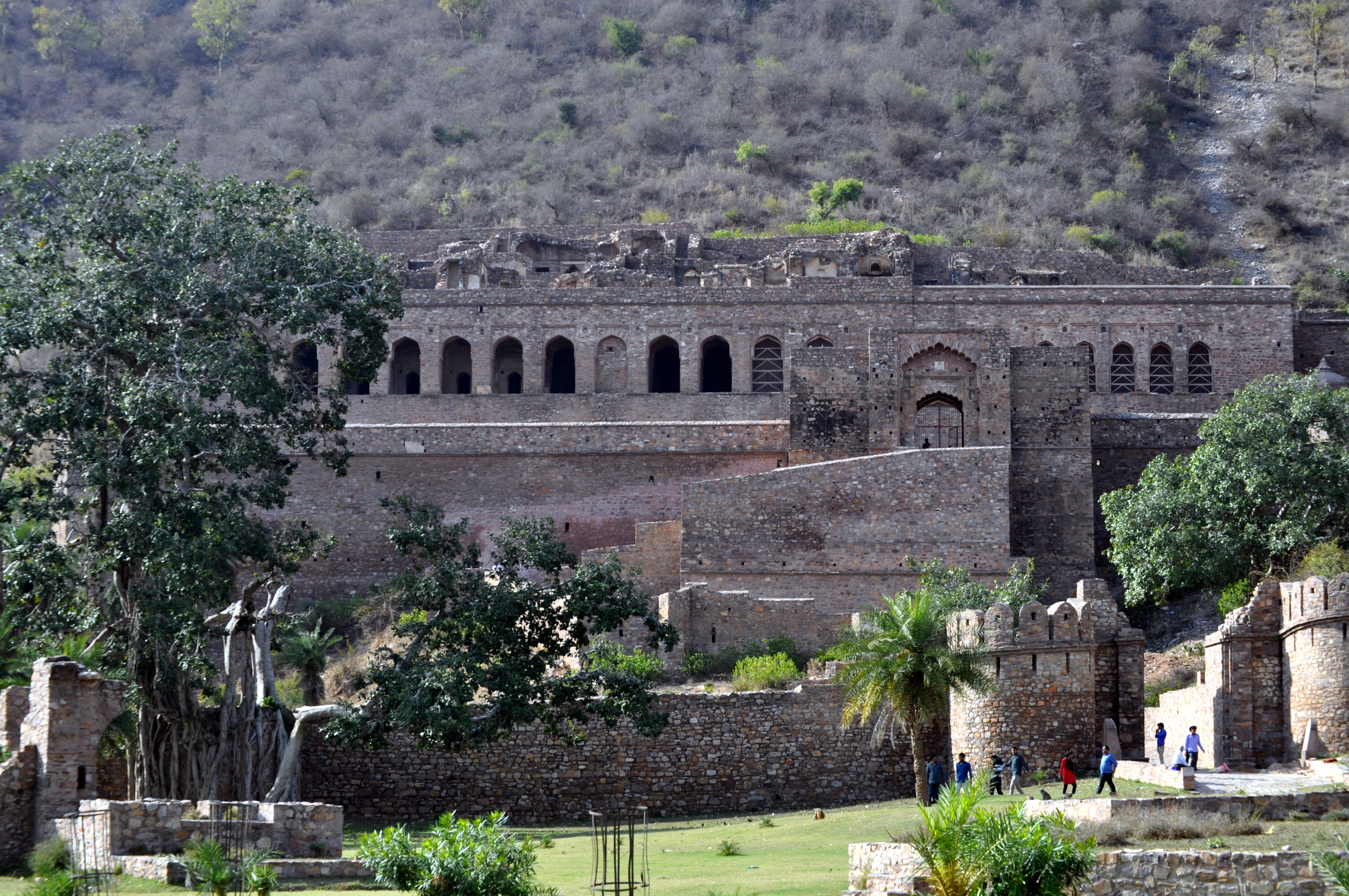 भूतों का भानगढ़- संरक्षित स्मारक, राजस्थान